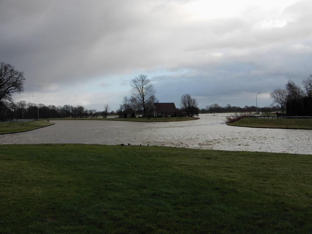 De Kruising van de Vecht met kanaal Almelo-de Haandrik bij Gramsbergen.